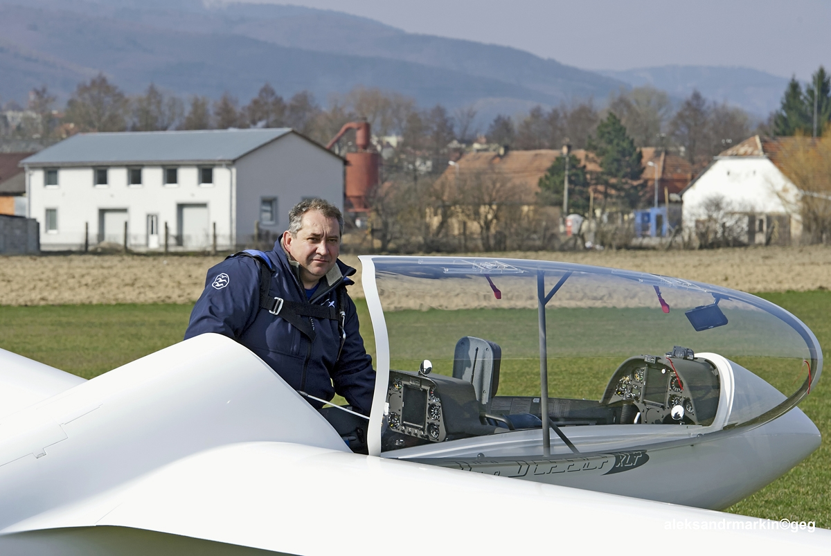 Prievidza.Slovakia Президент Федерации планерного спорта России - Рябчинский Сергей